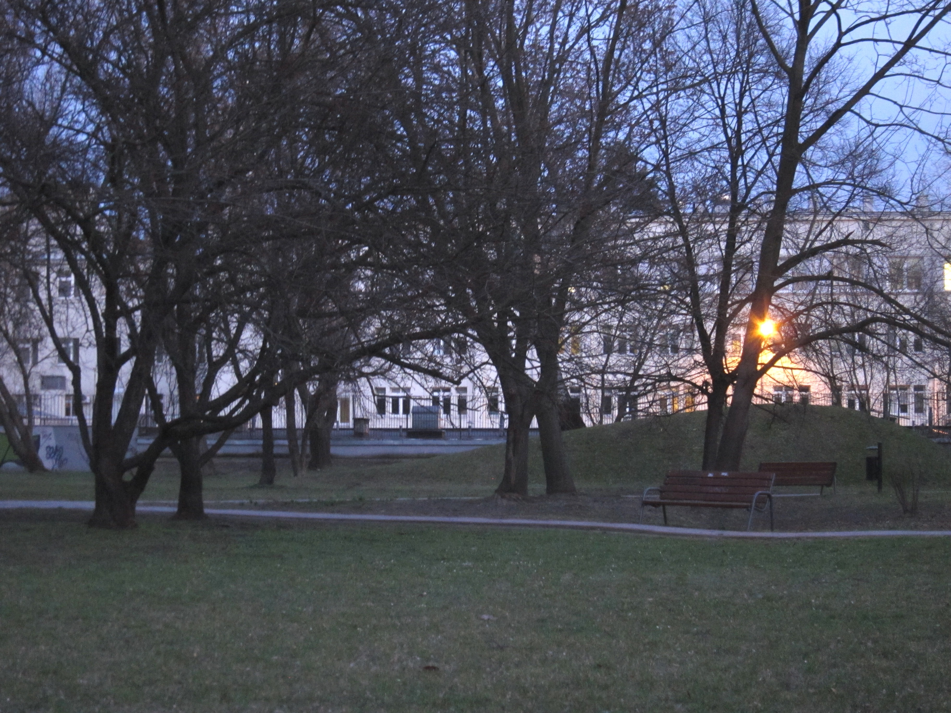 Сквер радіо-родини Матисякових, вул. Беднарська, Варшава (Польща)